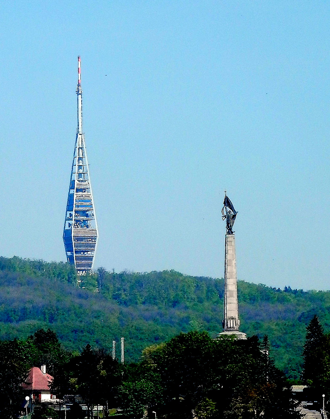 Televízna veža Kamzík a vojnový cintorín Slavín, pohľad z Bratislavského hradu. Mesto Bratislava. Rok 2014.